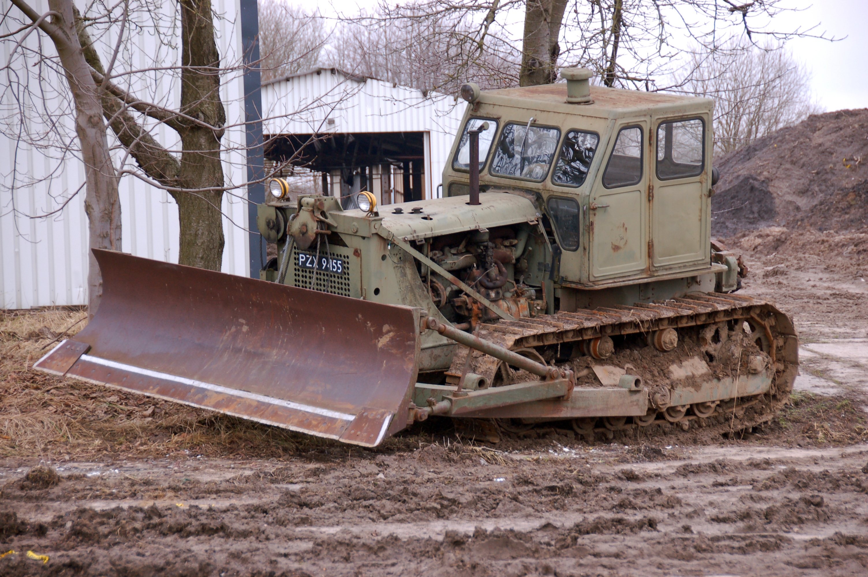 Technikpark MV in Grimmen, Raupe T-100